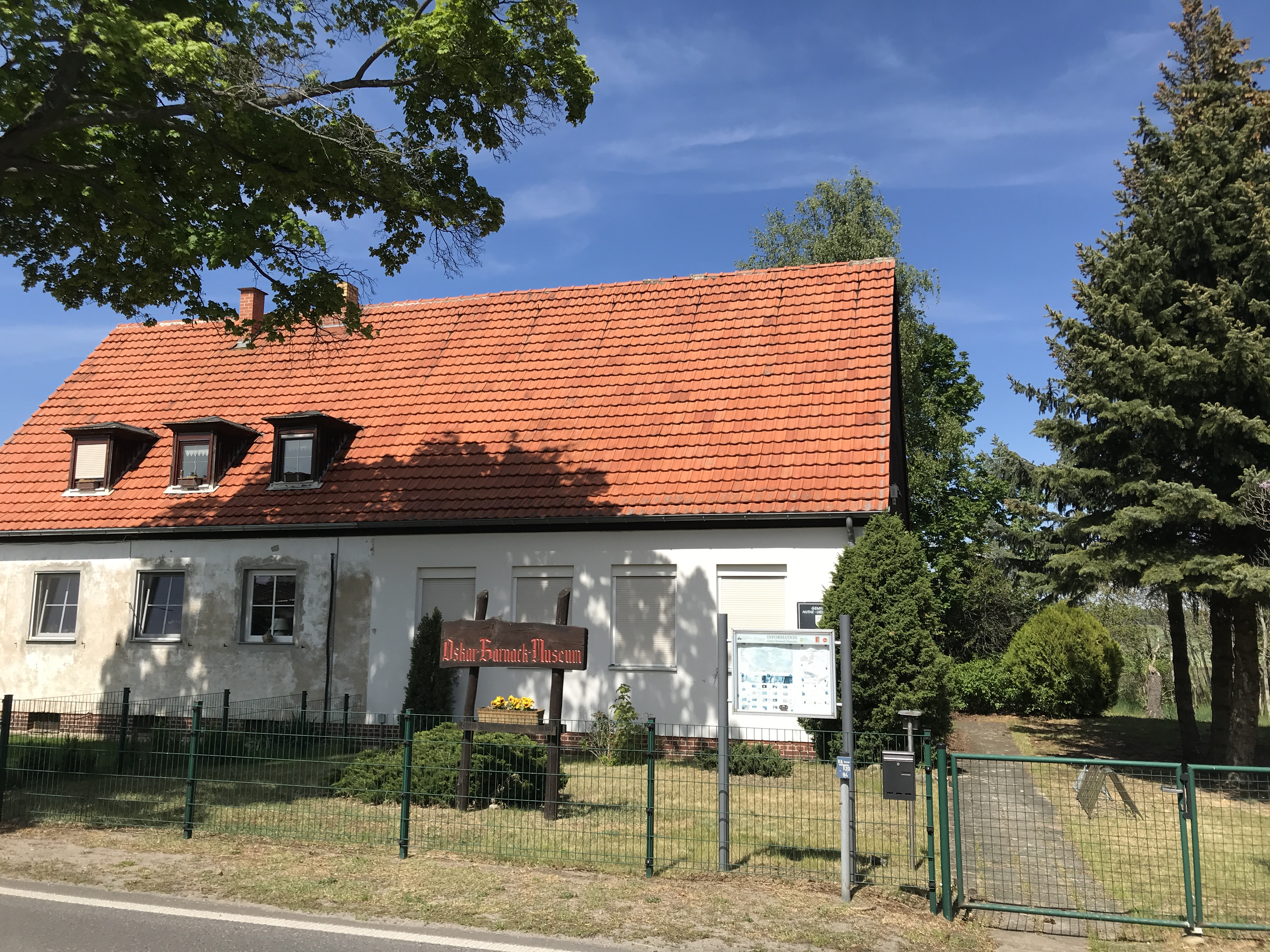 Oskar-Barnack-Museum in Lynow, Baruth/Mark in Brandenburg